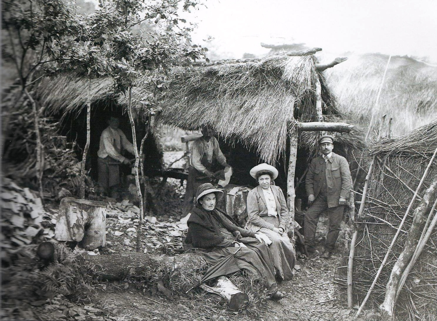 Hutte de sabotiers en forêt de Toulfouën (photographie de Philippe Tassier, vers 1910).